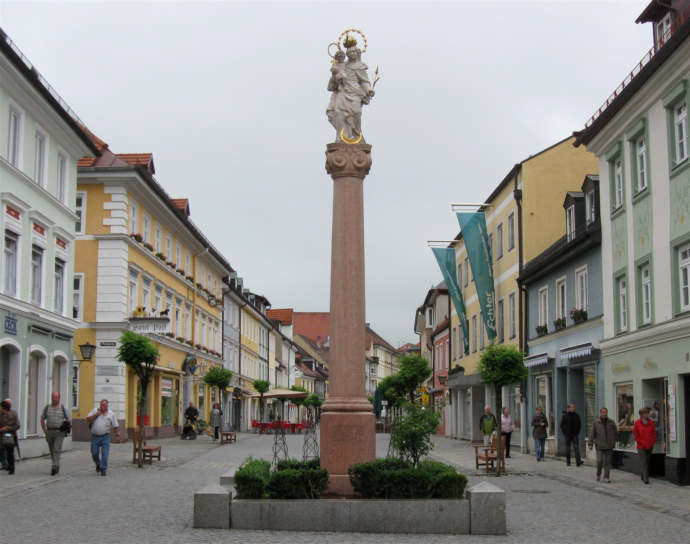 Untermarkt; Mariensäule, barocke Madonnenfigur auf hoher Steinsäule, um 1700, 1859 überarbeitet, 1939 entfernt und 1975 wieder aufgestellt.